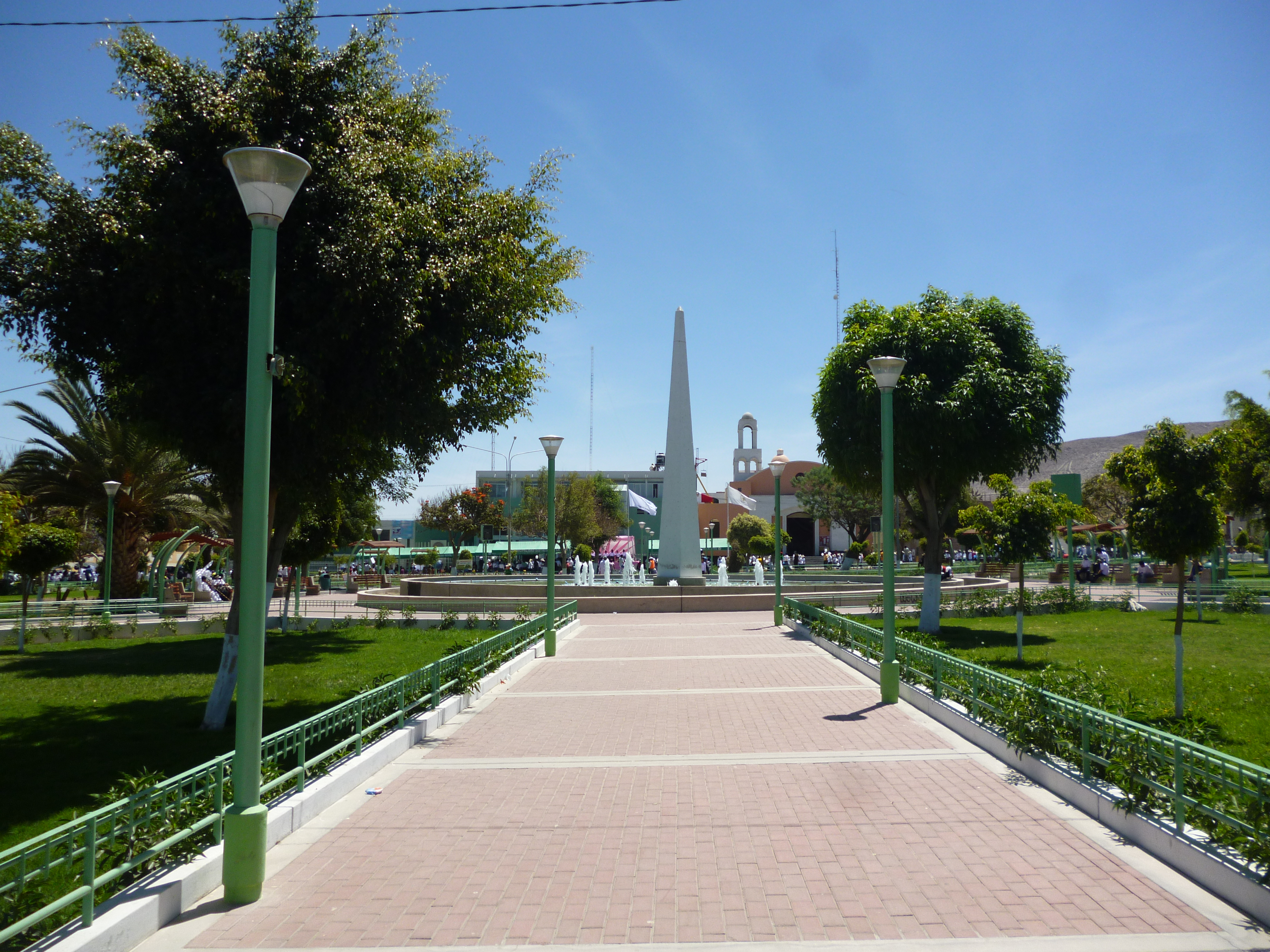 La Plaza Municipal del Distrito de La Joya en Arequipa.